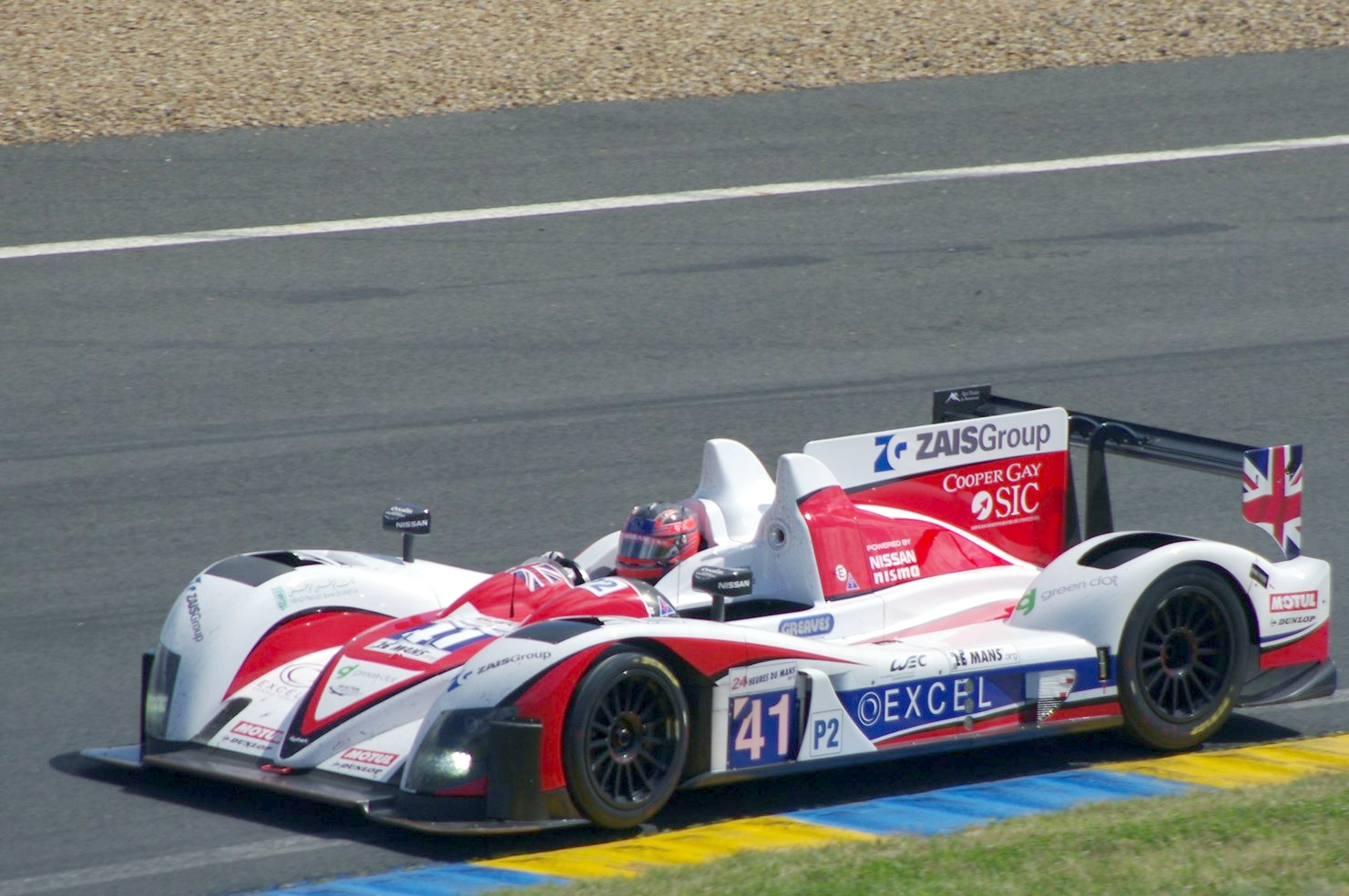 Le Mans 24 Hours, 2012